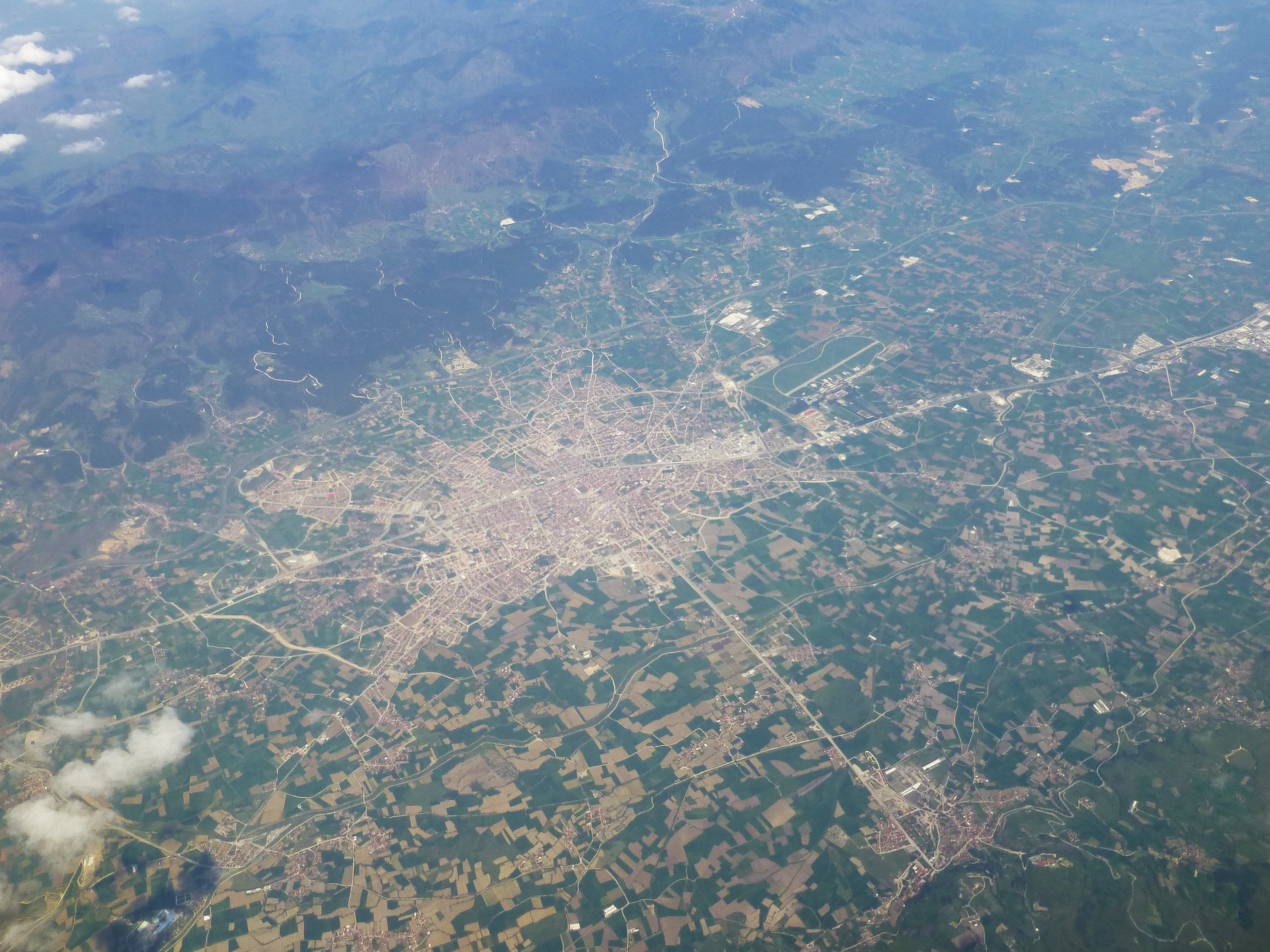 Vue aérienne entre Ankara et Istanbul